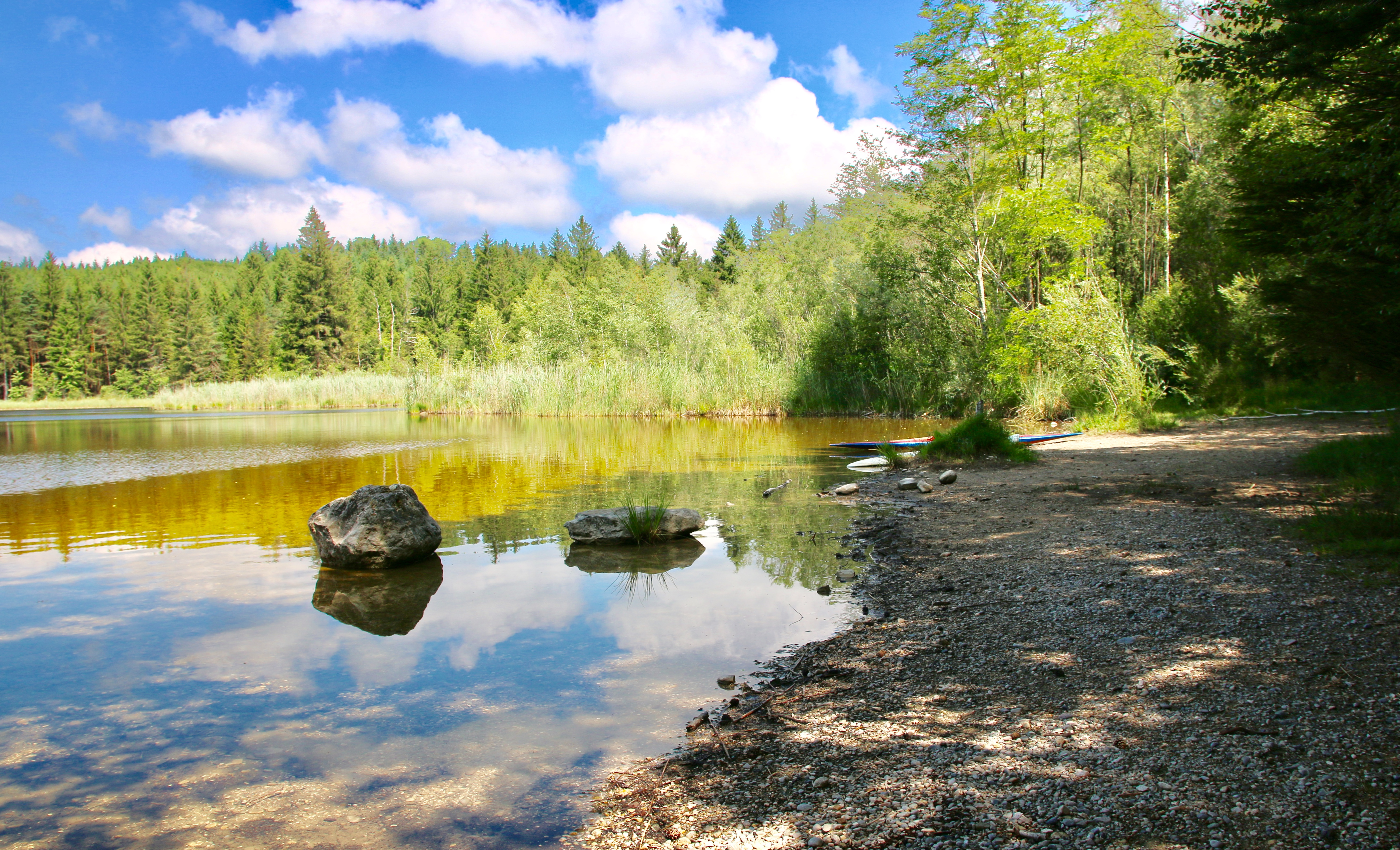 Der Maistättenweiher im Sommer in der Gemeinde Tutzing in der Nähe von Pähl (Oberbayern).